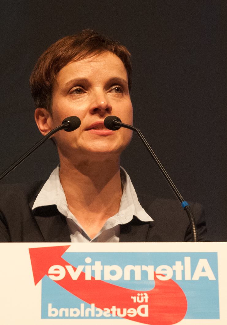 a.o. Bundesparteitag der Alternative für Deutschland, 4. Juli 2015 in Essen, Gruga Halle a.o. Bundesparteitag der Alternative für Deutschland am 4./5. Juli 2015 in Essen, Gruga Halle